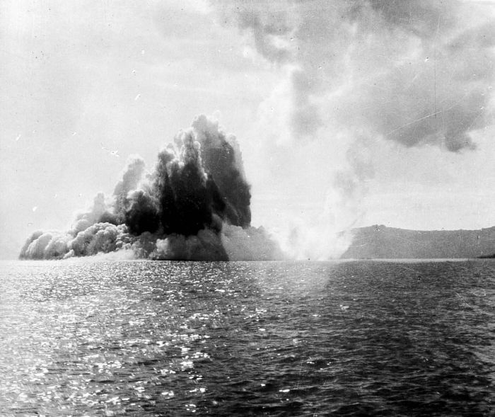 Repronegatief. Uitbarsting van de Krakatau